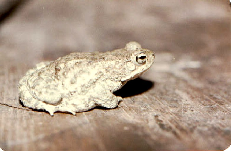 Bufo stomaticus